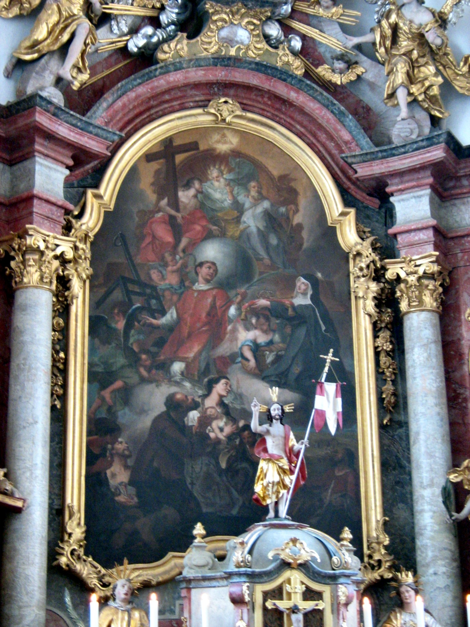 Hauptaltarbild der Pfarrkirche St. Laurentius und Elisabeth in Aulzhausen, Bayern